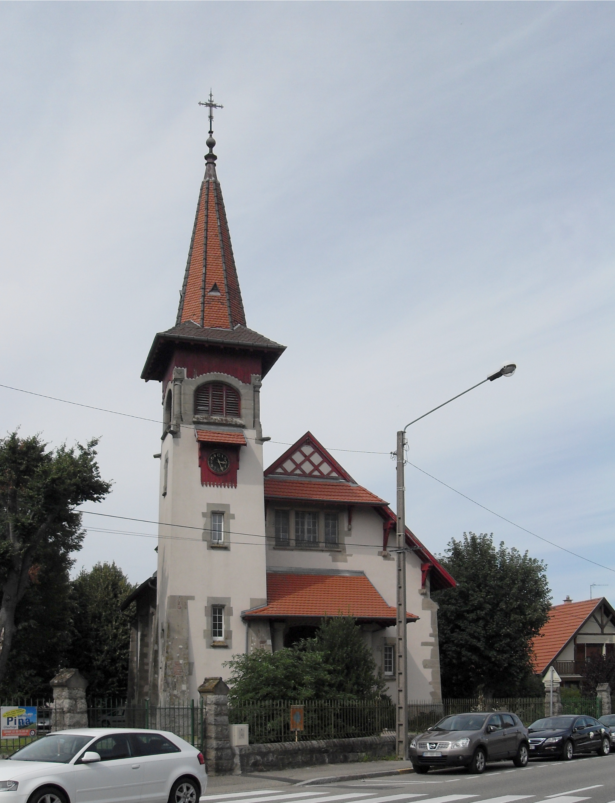 Le temple protestant à Cernay